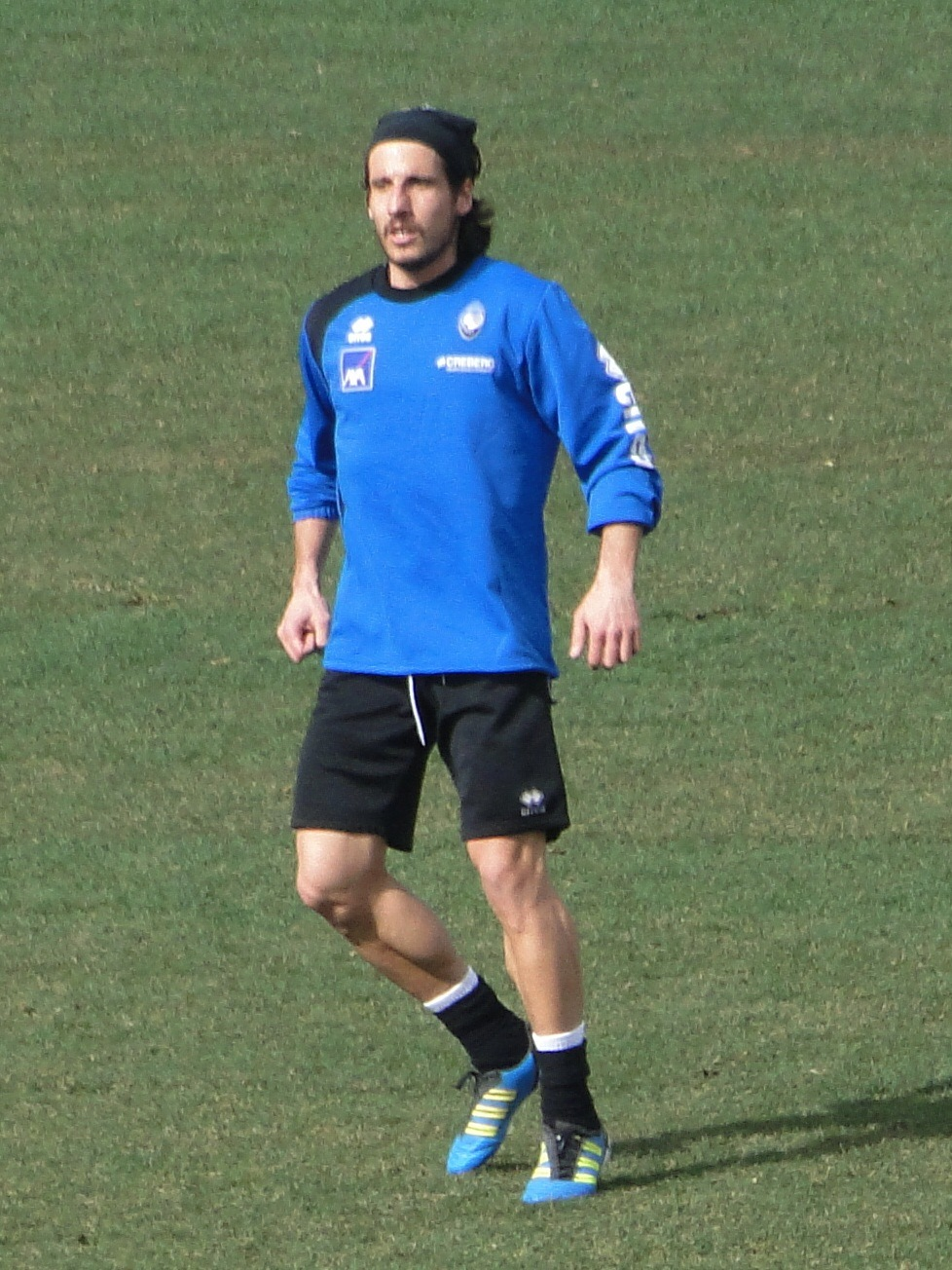 Cristiano Del Grosso, calciatore italiano